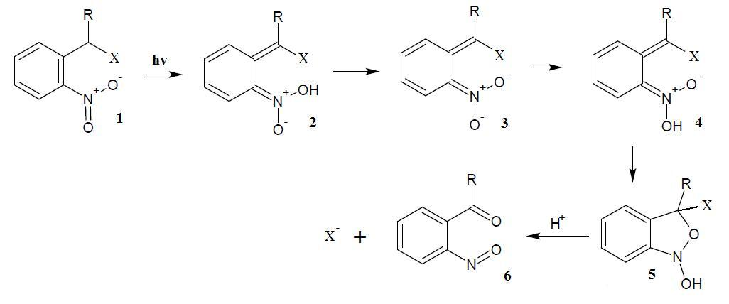 Detailne reaktsiooniskeem üldistatud nitrobensüül valgustundlike kaitserühmade jaoks.